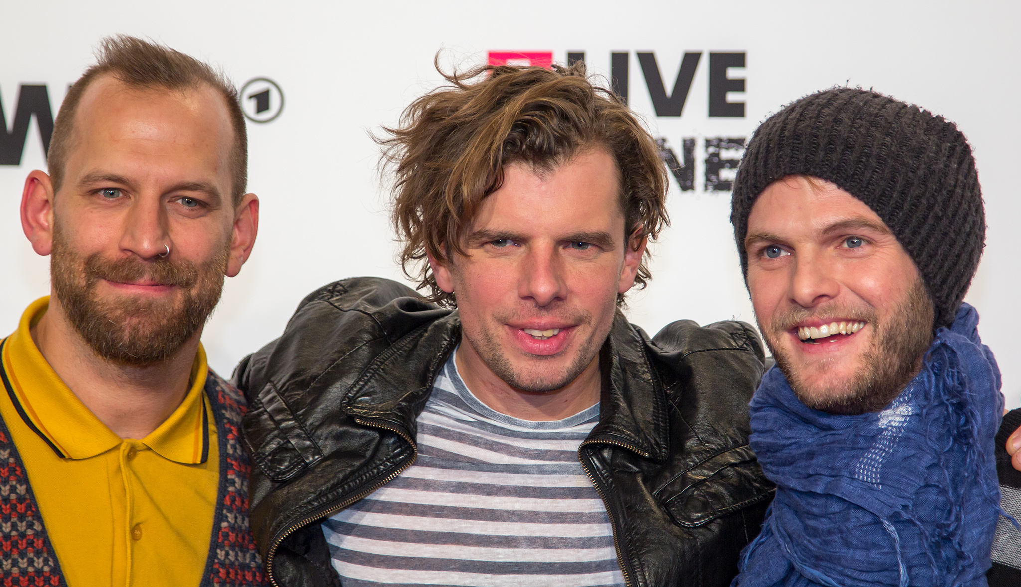 1LIVE Krone 2013: Sportfreunde Stiller auf dem roten Teppich